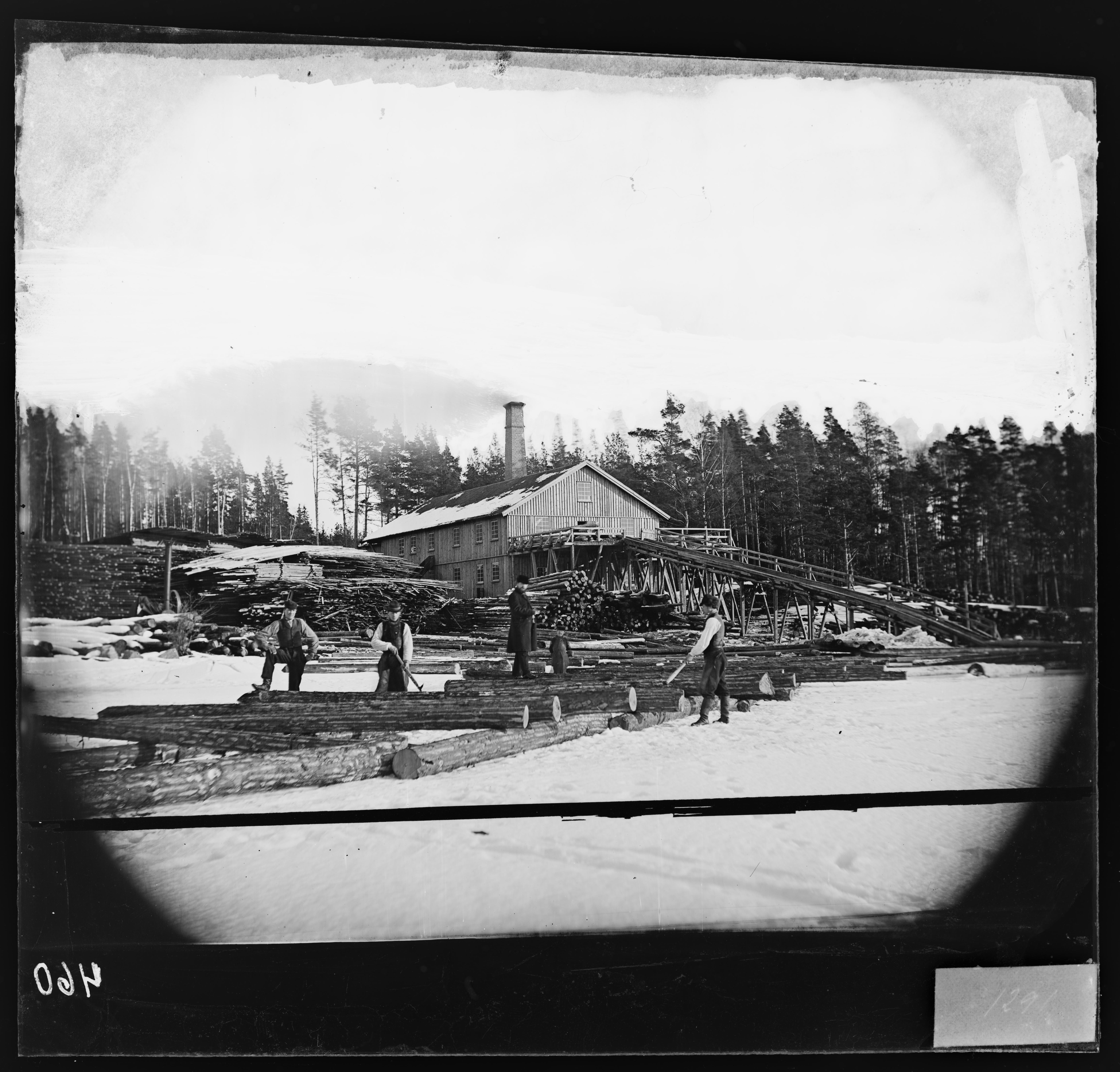 Sted: Arvika Kommune: Arvika Fylke: Värmland Tagger